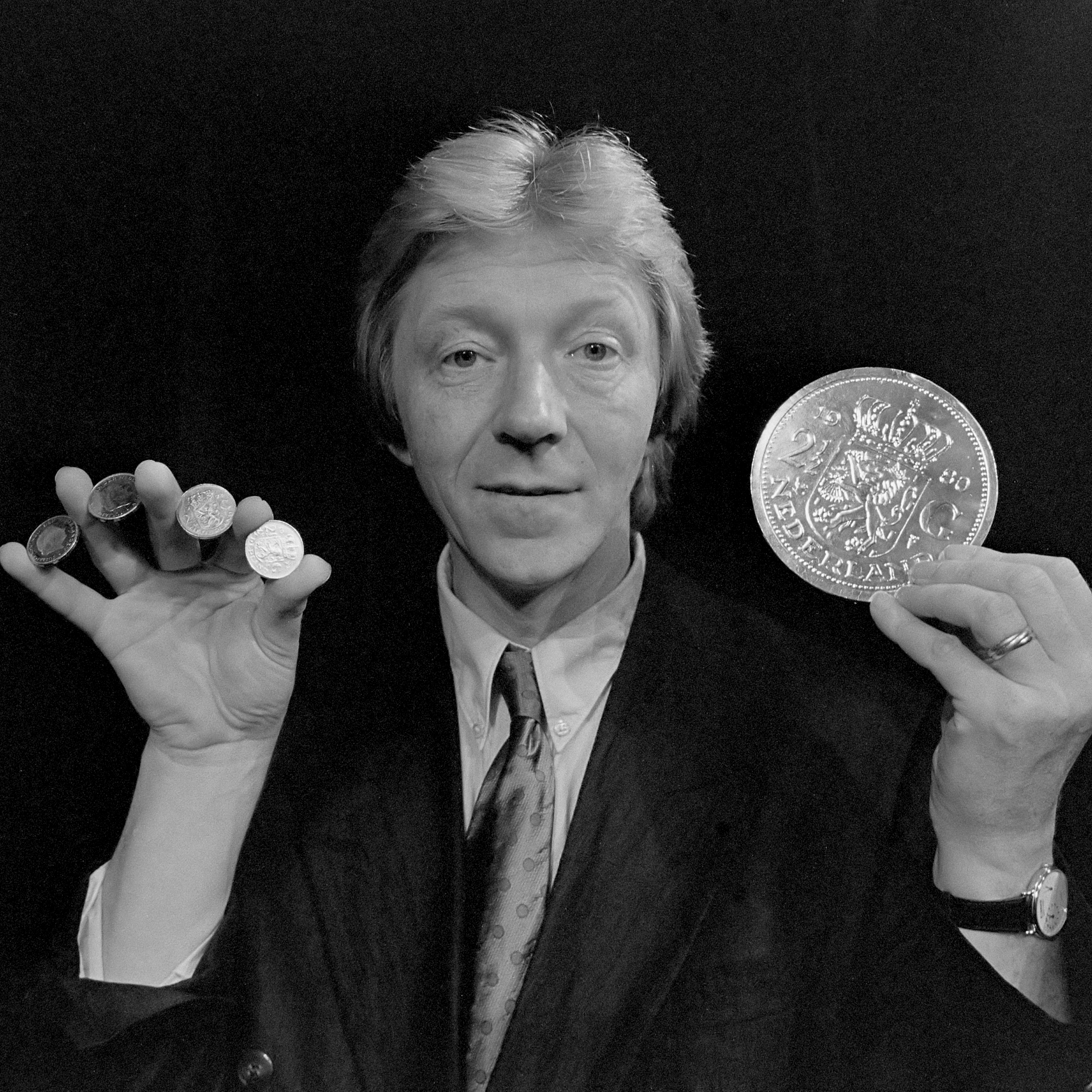 Opdracht Gelderlander; Richard Ross (goochelaar) 29 juni 1988